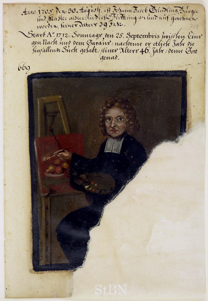 Johann Jacob (Johann Jacob; Johann Jakob) Gundling, Mahler (Maler) Transkription und weitere Informationen